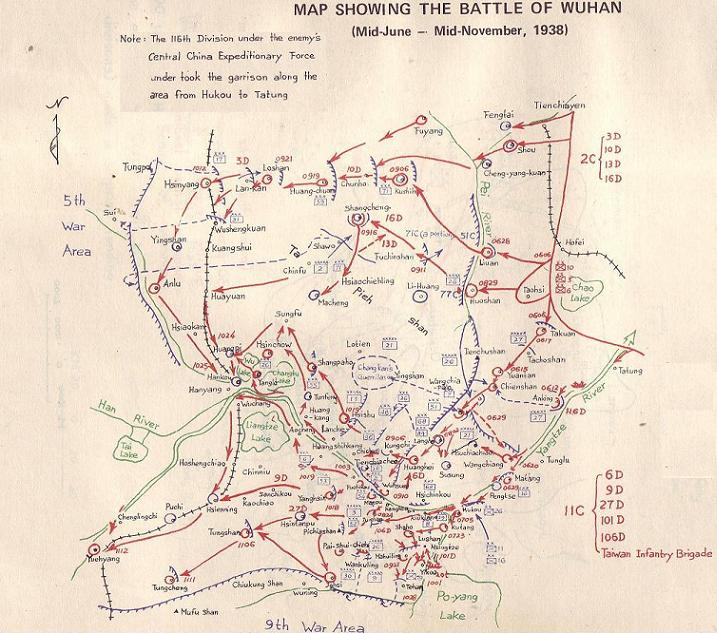 Lược đồ trận Vũ Hán. Thể loại:Chiến tranh Trung-Nhật